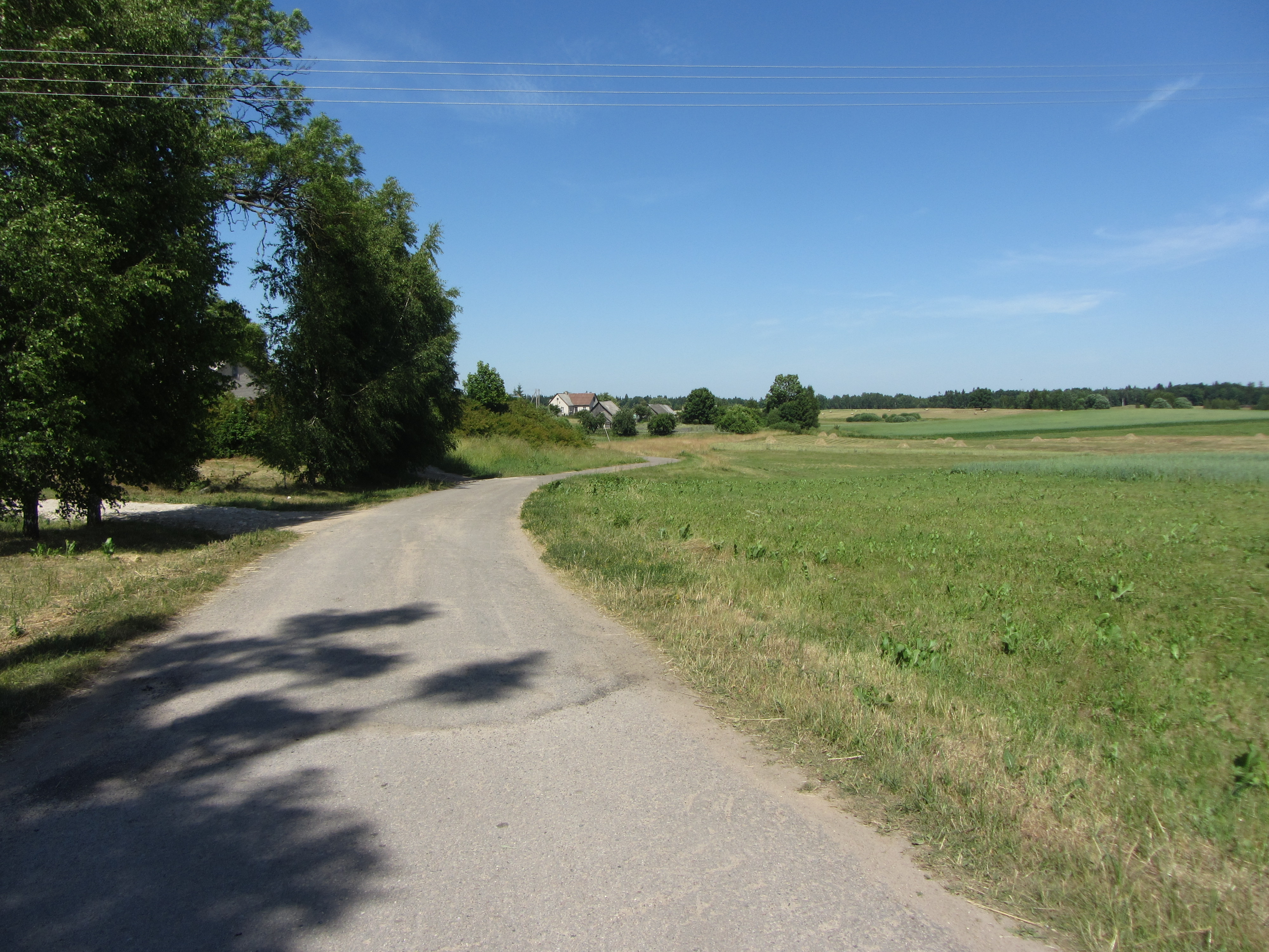 Barboriškės 21320, Lithuania